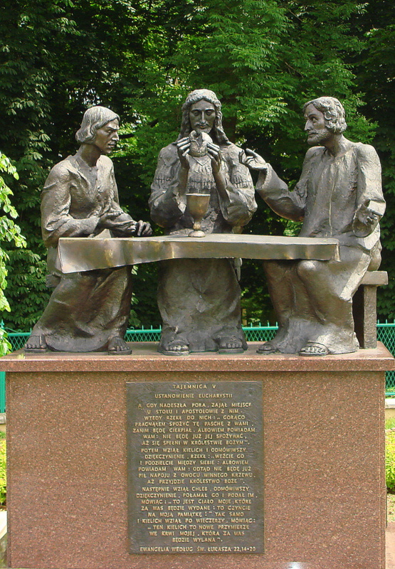 Częstochowa, zespół klasztorny paulinów na Jasnej Górze